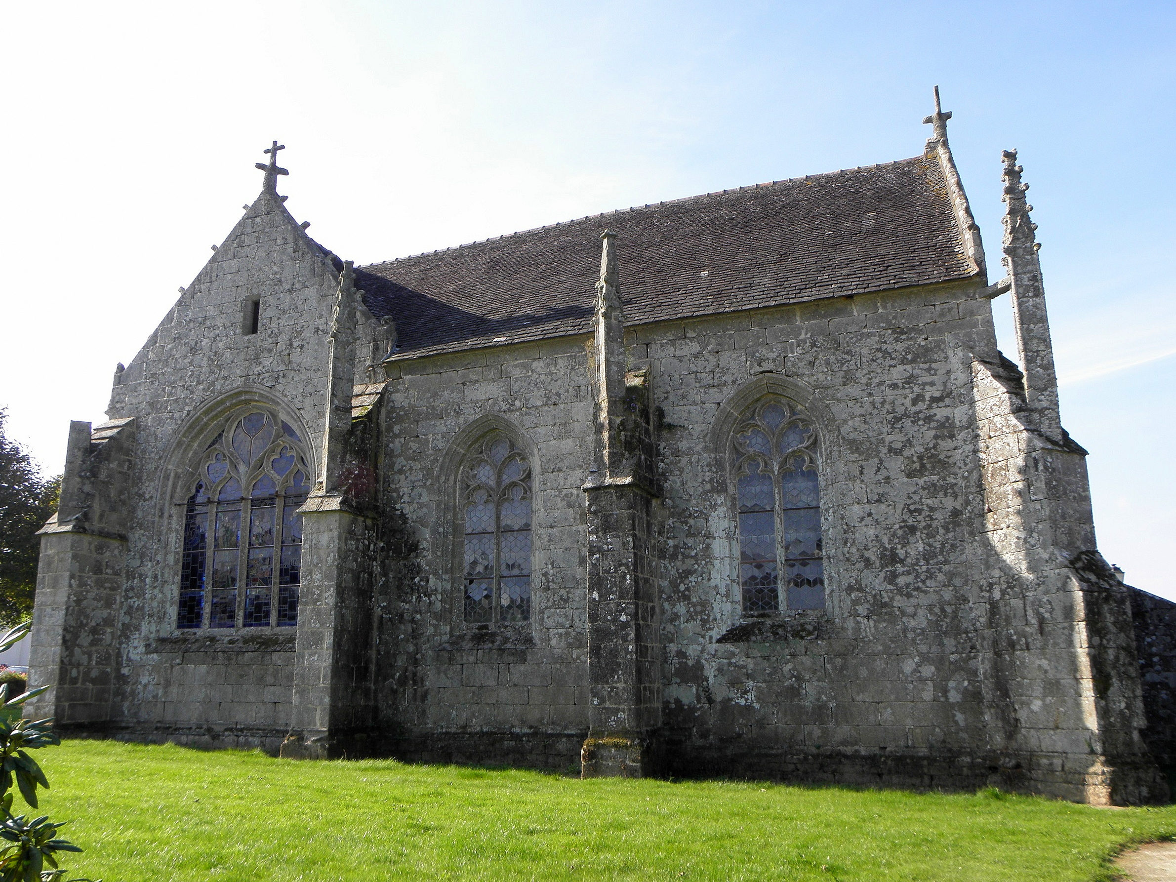 Chapelle Notre-Dame de Quilinen en Landrévarzec (29). Chevet.